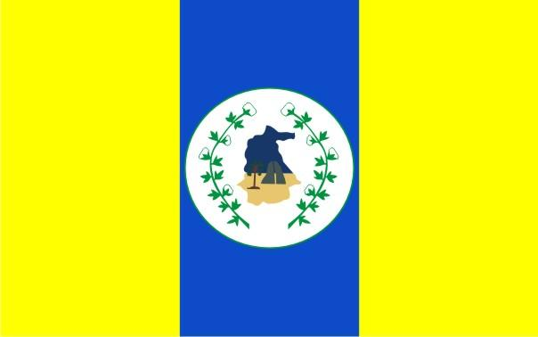 Bandeira do municípo de Itapipoca, estado do Ceará, Brasil